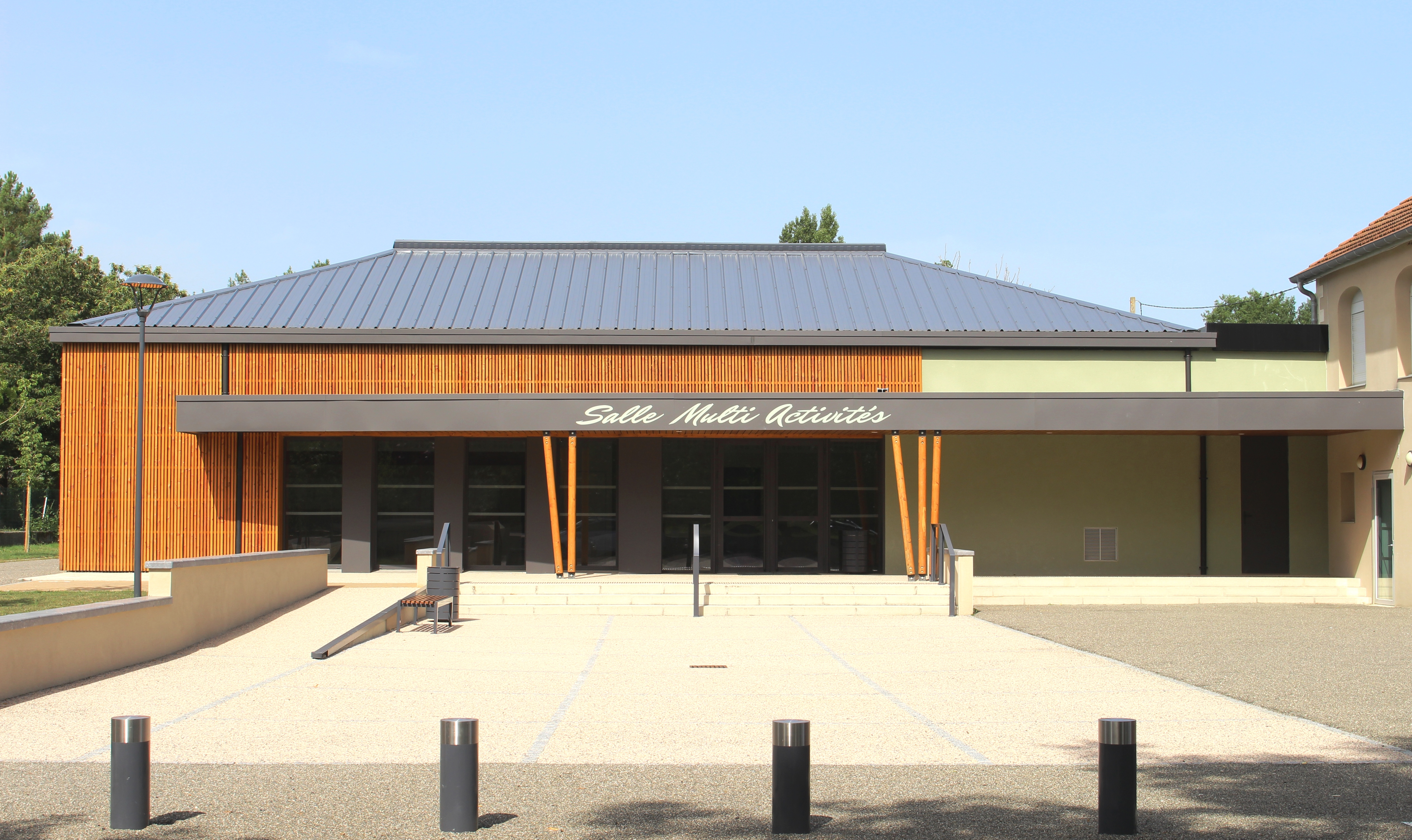 Salle des fêtes de Siarrouy (Hautes-Pyrénées)